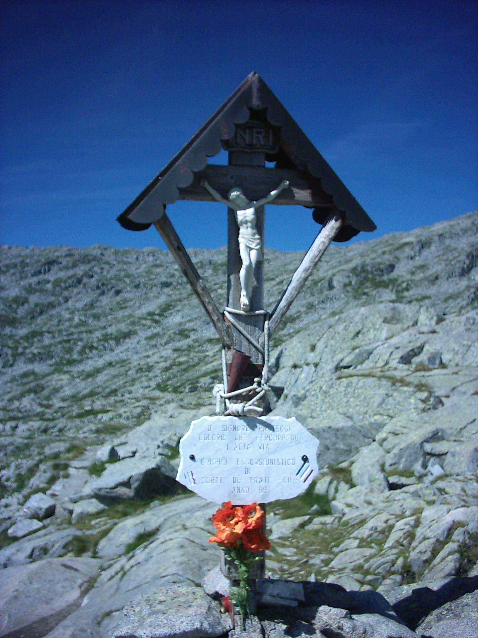 Crocifisso e targa presso il Lago della Vacca (2350 m) all'inizio dell'alta via dell'Adamello.